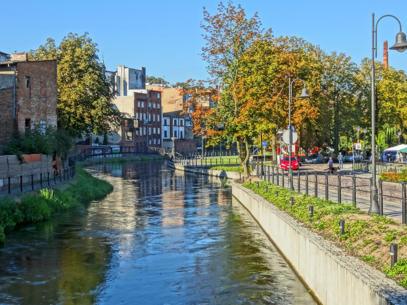 Wenecja Bydgoska – zespół architektoniczny Starego Miasta w Bydgoszczy zbudowany bezpośrednio nad rzeką Młynówką (1870-1900).